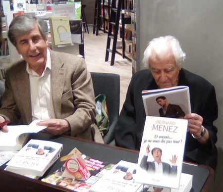 Bernard Ménez et Jacques Rozier (à la soirée dédicace de l'autobiographie de B. Ménez)